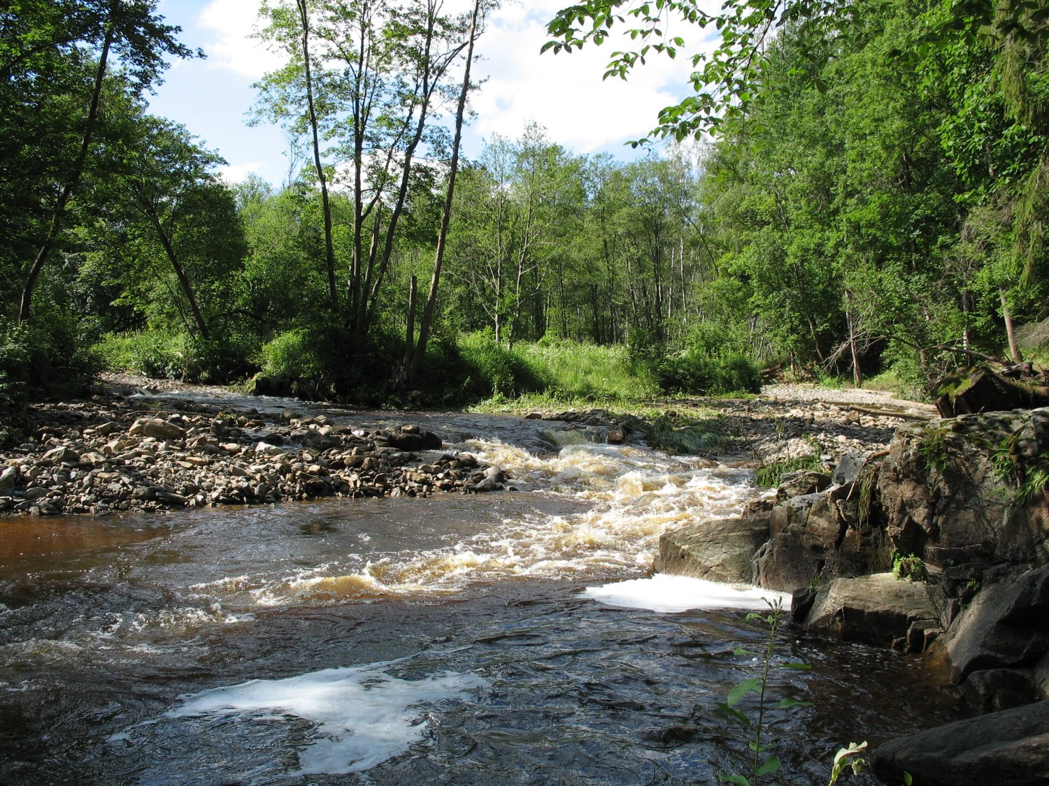 Řeka Blanice (přítok Otavy) v přírodní rezervaci Na soutoku